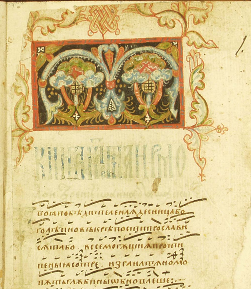 Воскресный Ирмос Первого гласа, Песнь 1: "Твоя победительная десница Боголепно в крепости прославися: та бо, Безсмертне, яко всемогущая, противныя сотре, Израильтяном путь глубины обновляше." «Стихирарь крюковый», полуустав. начало ХVI века